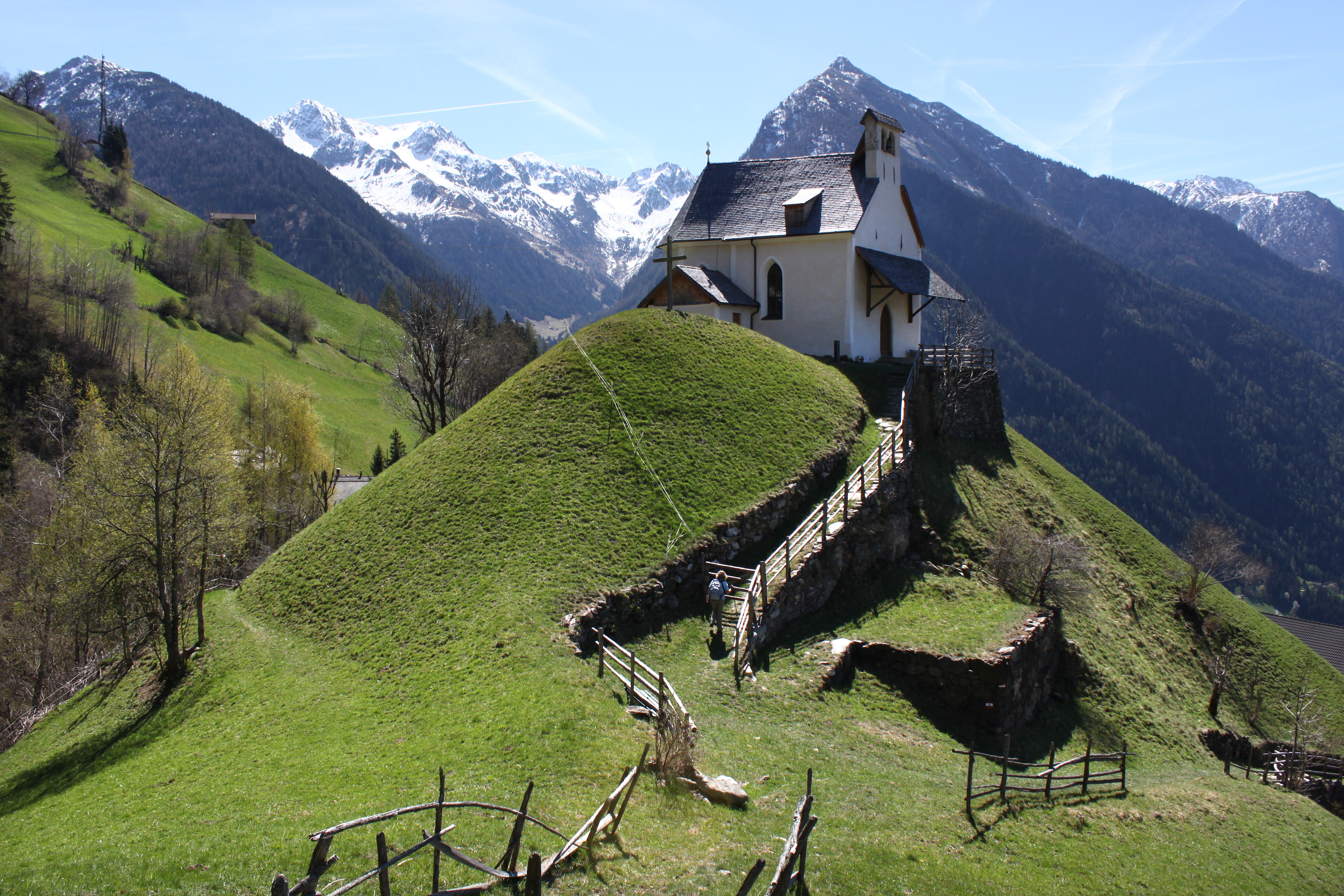 Blick zum Kirchlein St. Hippolyt (1201 m.ü.M.) beim Weiler Glaiten in der Nähe von Stuls. Die kleinen Orte liegen in der Gemeinde St. Leonhard in Passeier in Südtirol.